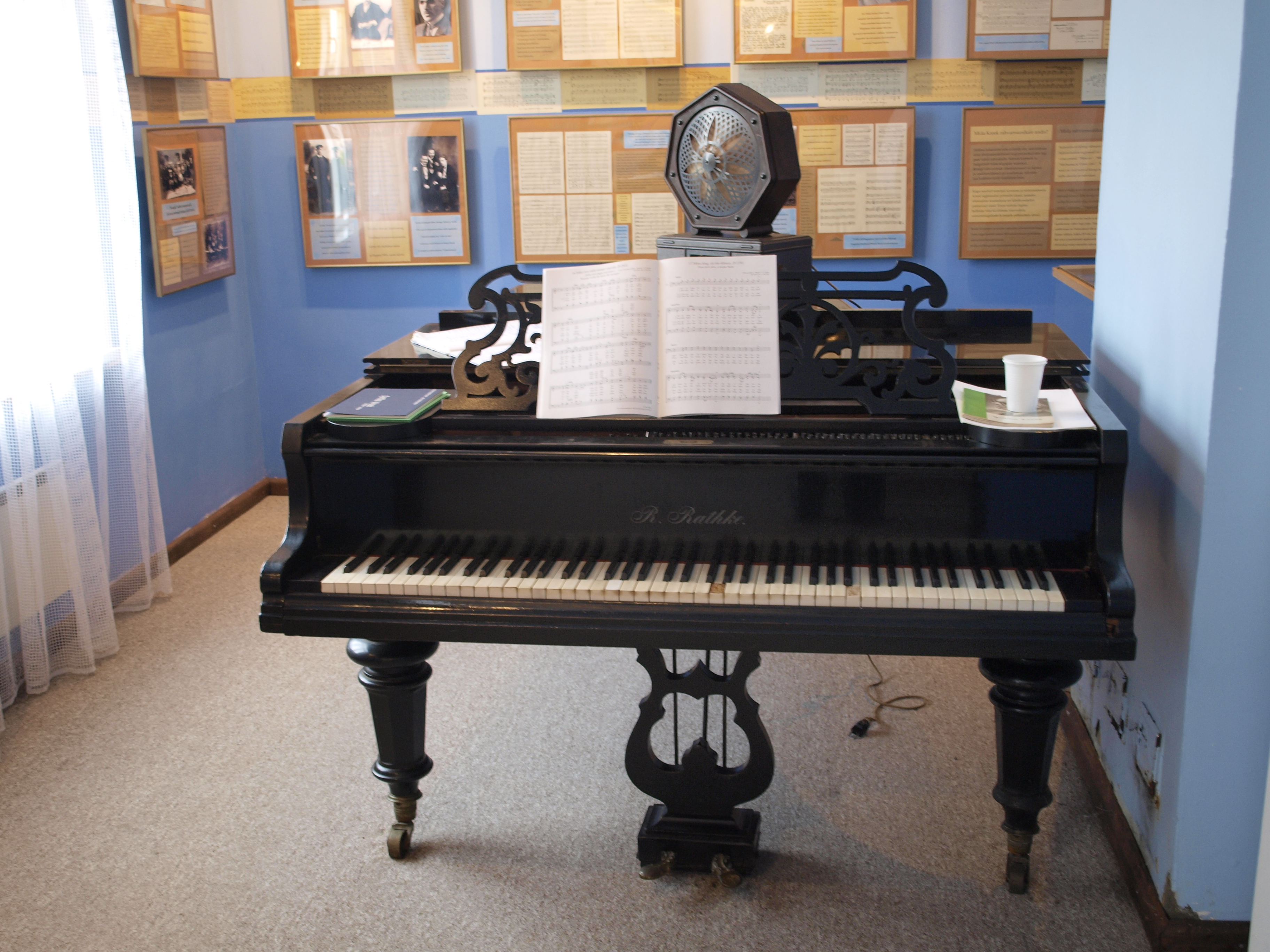 Maja, kus aastail 1939.1962 elas Cyrillus Kreek